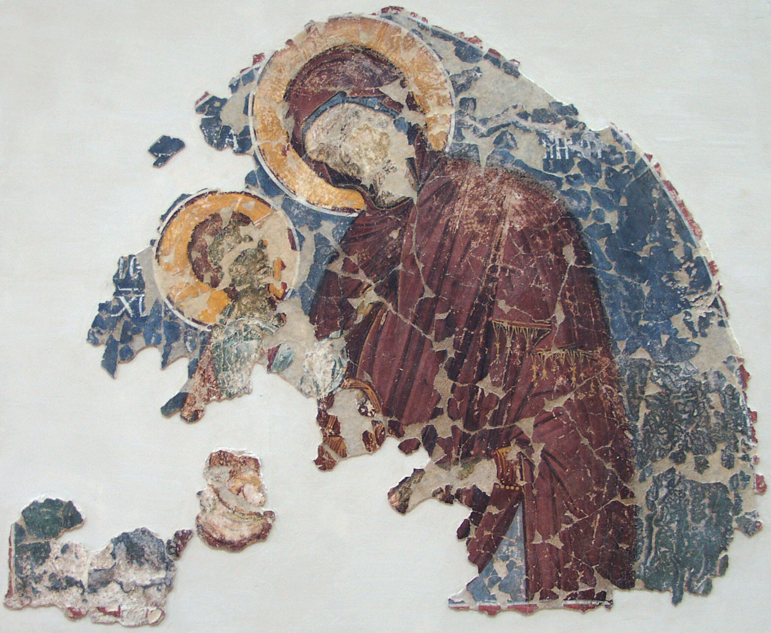 Фреска Богоматери Одигитрии 30-40-х годов XIV века из Балаклавы